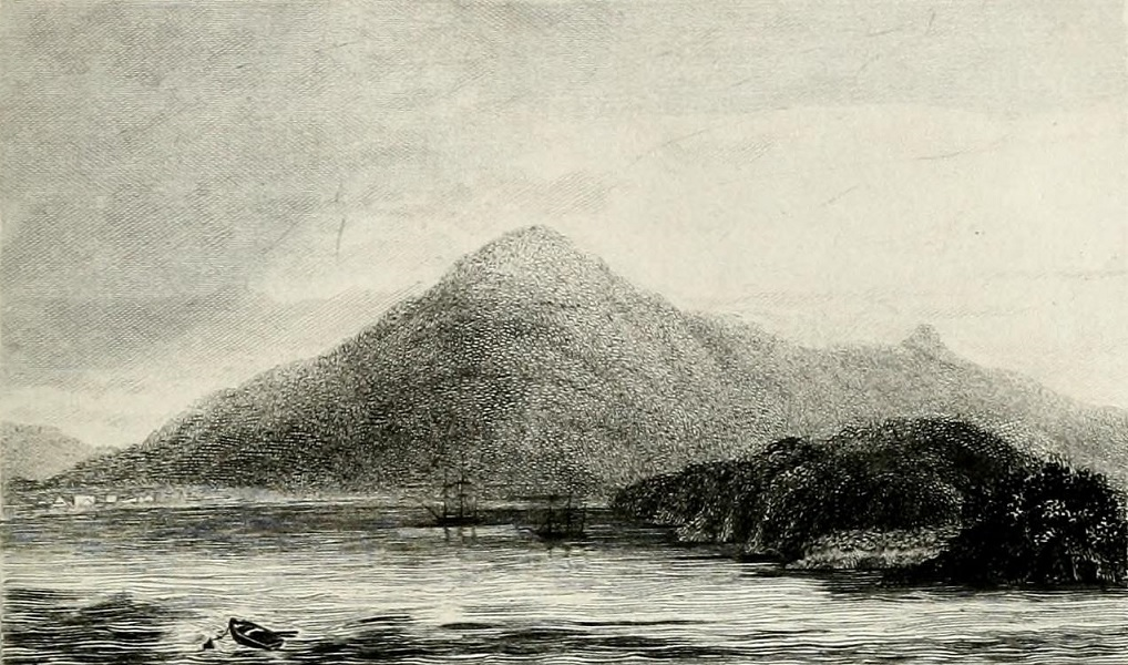 Puerto de Hambre 1827, vista norte, en el Estrecho de Magallanes, durante la expedición del almirante Phillip Parker King, tomado del libro "Narrative of the surveying voyages of His Majesty's Ships Adventure and Beagle between the years 1826 and 1836, describing their examination of the southern shores of South America, and the Beagle's circumnavigation of the globe. Proceedings of the first expedition, 1826-30, under the command of Captain P. Parker King, R.N., F.R.S. London: Henry Colburn".